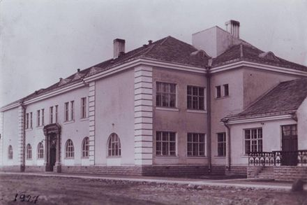 Narva Kesklinna Gümnaasiumi eelkäja 1927. aastal